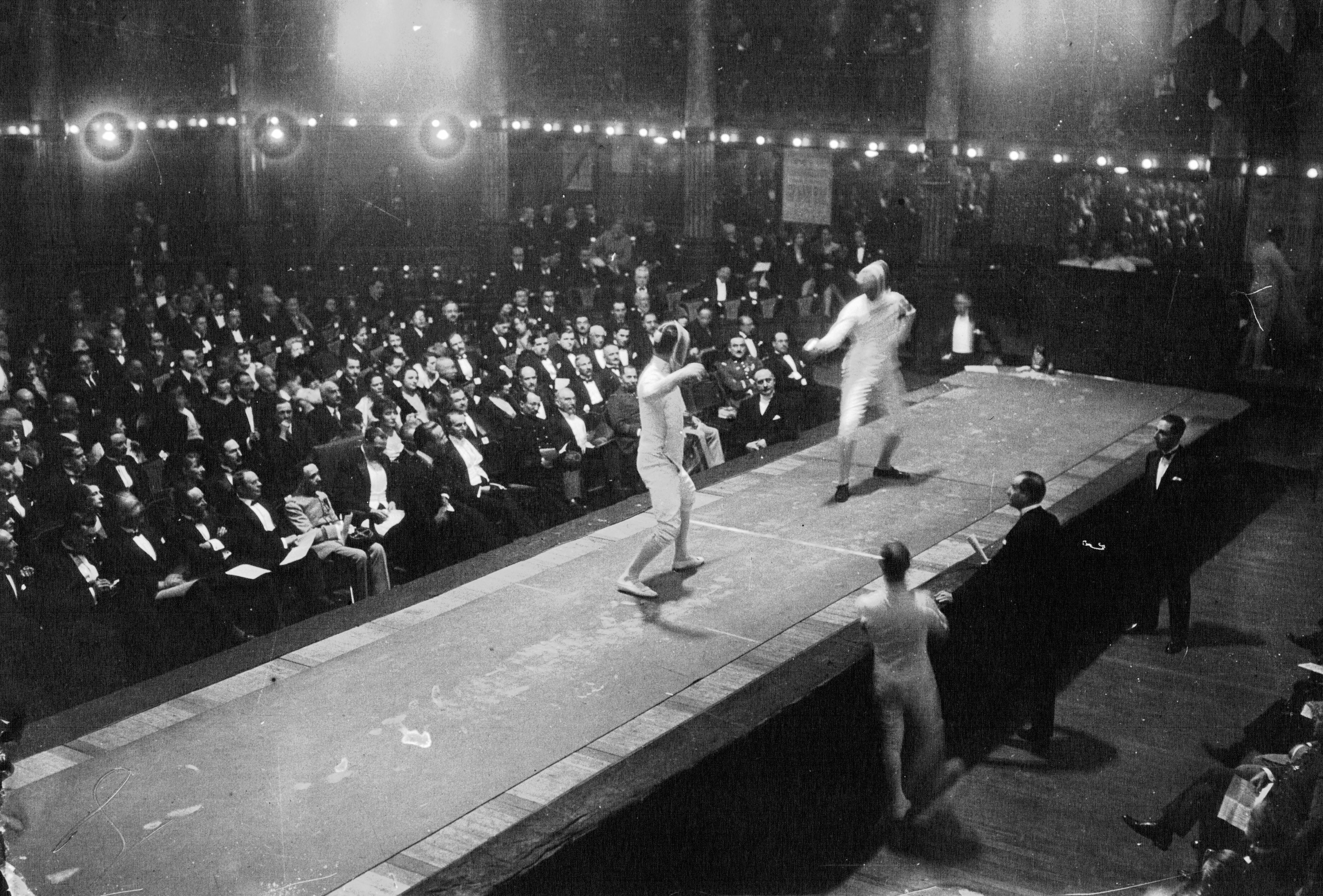 Epée : salle Wagram : Lucien Gaudin, Tainturier : photographie de presse